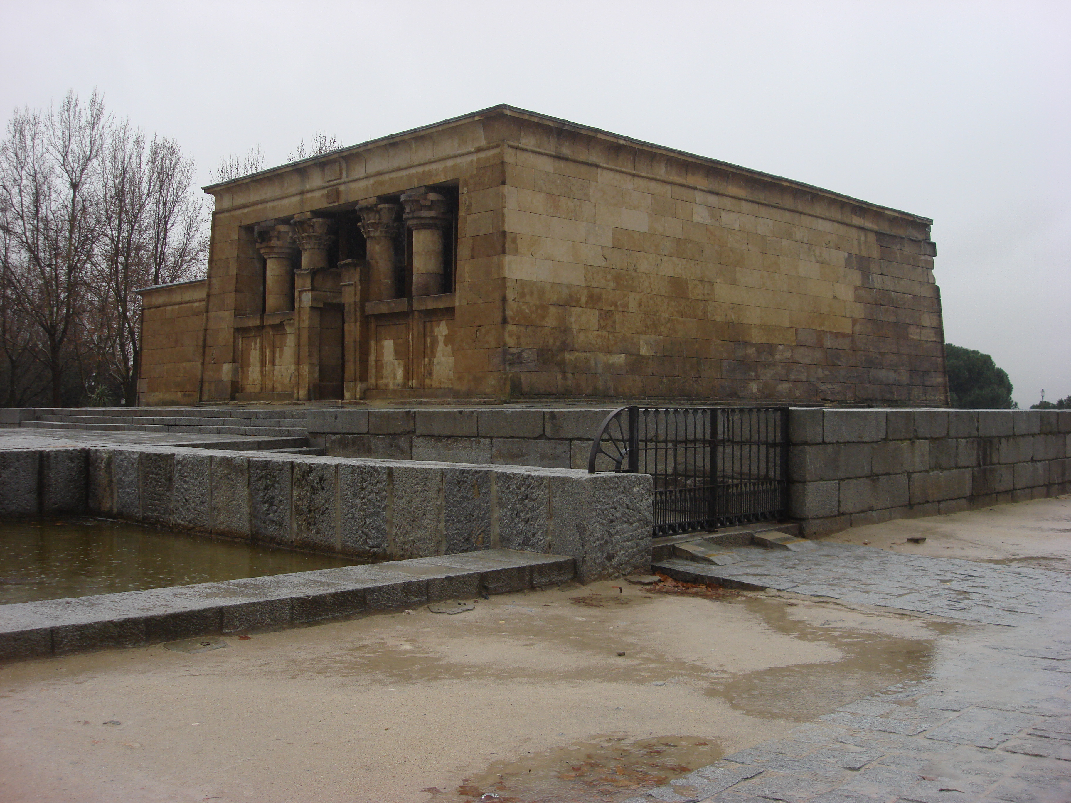 Own work